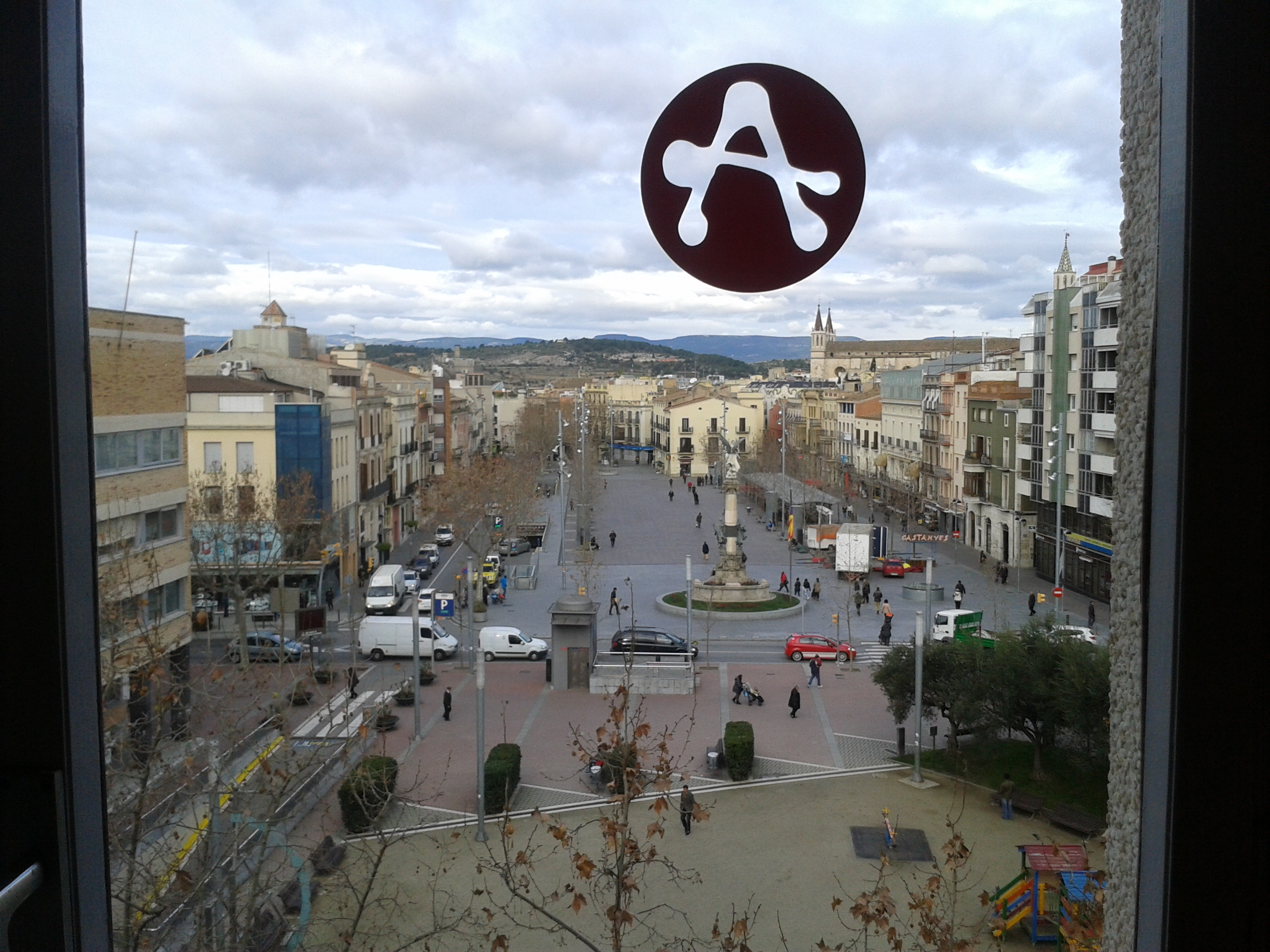 Seu: Vilafranca del Penedès, Plaça del Penedès